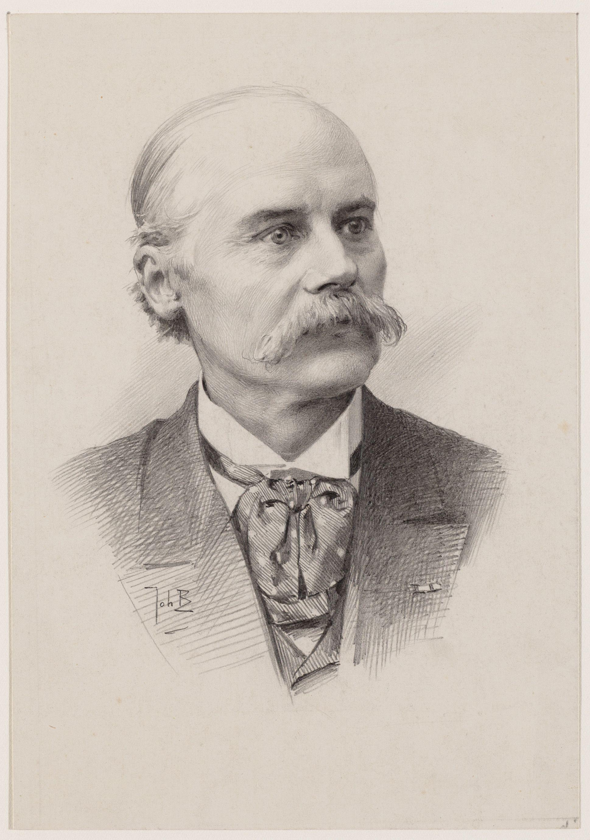 Beschrijving Jacob Cornelis van Marken (1845-1906), oprichter N.V. Nederlandse Gist- en Spiritusfabriek Documenttype tekening Vervaardiger Braakensiek, J.C. (Johan Coenraad, 1858-1940) Collectie Collectie Stadsarchief Amsterdam: tekeningen en prenten Datering 1900 ca. Inventarissen Afbeeldingsbestand 010097007989